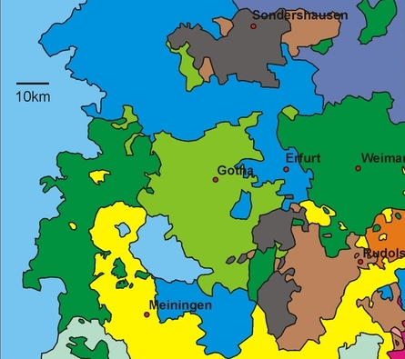 Karte mit Schwarzburg-Rudolstadt (braune Farbe) und Schwarzburg-Sondershausen (dunkelgraue Farbe) aus dem Jahr 1910